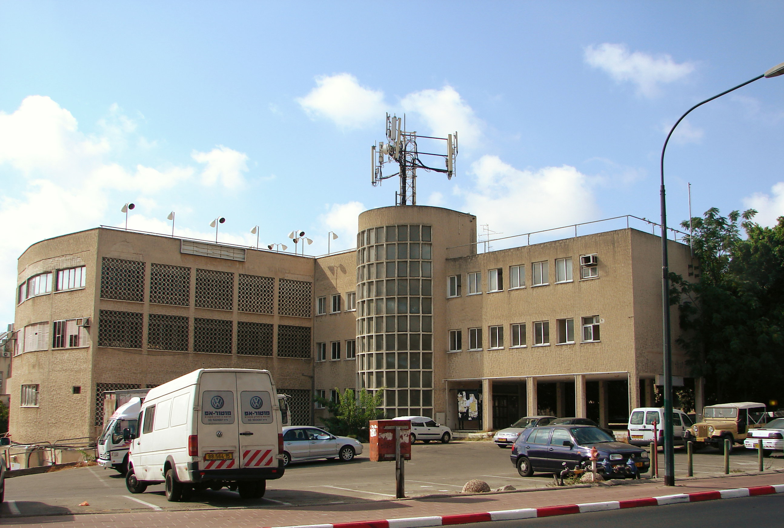 Histadrut building in Ramat Gan